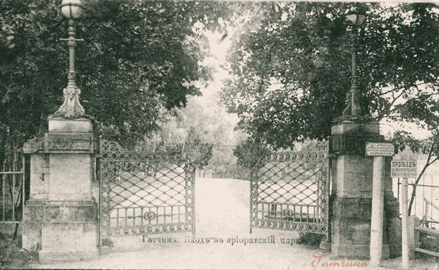 Ворота в Приоратский парк. Гатчина, Россия